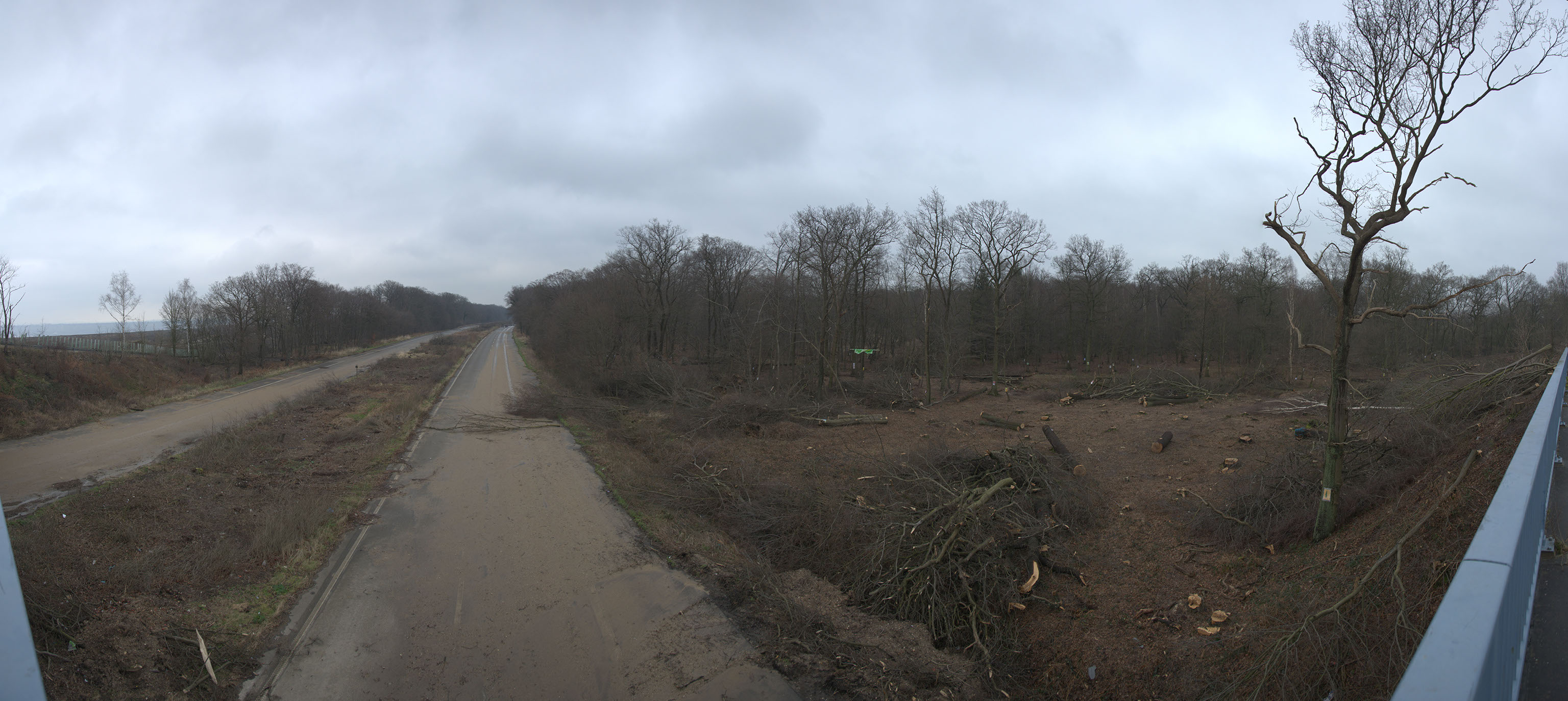 Die Westecke des Hambacher Forsts und die alte BAB 4 im Februar 2016 von der Brücke Etzweiler Weg in Merzenich fotografiert, nördlich vom Ortsteil Morschenich (Alt), Blick nach Osten; am linken Bildrand der vorrückende Tagebau Hambach